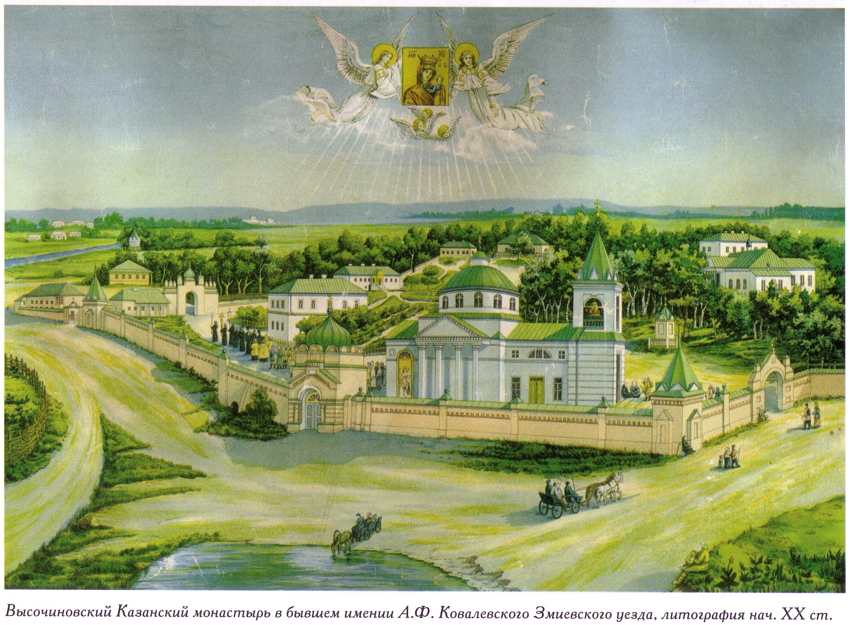 Змиевской уезд Харьковской губернии. Высочиновский Казанский монастырь. Литография самого начала XX века. Над монастырём изображена чудотворная Высочиновская Казанская икона Божией матери.